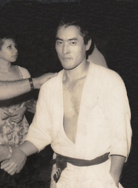 Shunji Hinata en 1960 siendo saludado después de conquistar otro título.